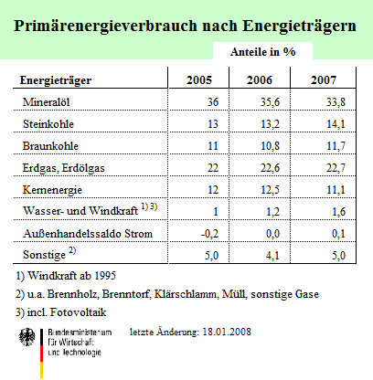 Energieverbrauch 2005-2007